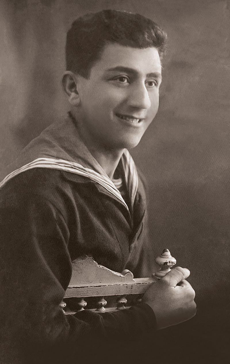 Qara Dəniz Ali Hərbi – Dəniz Məktəbinin müdavimi Cəlil Cavadov, 1937